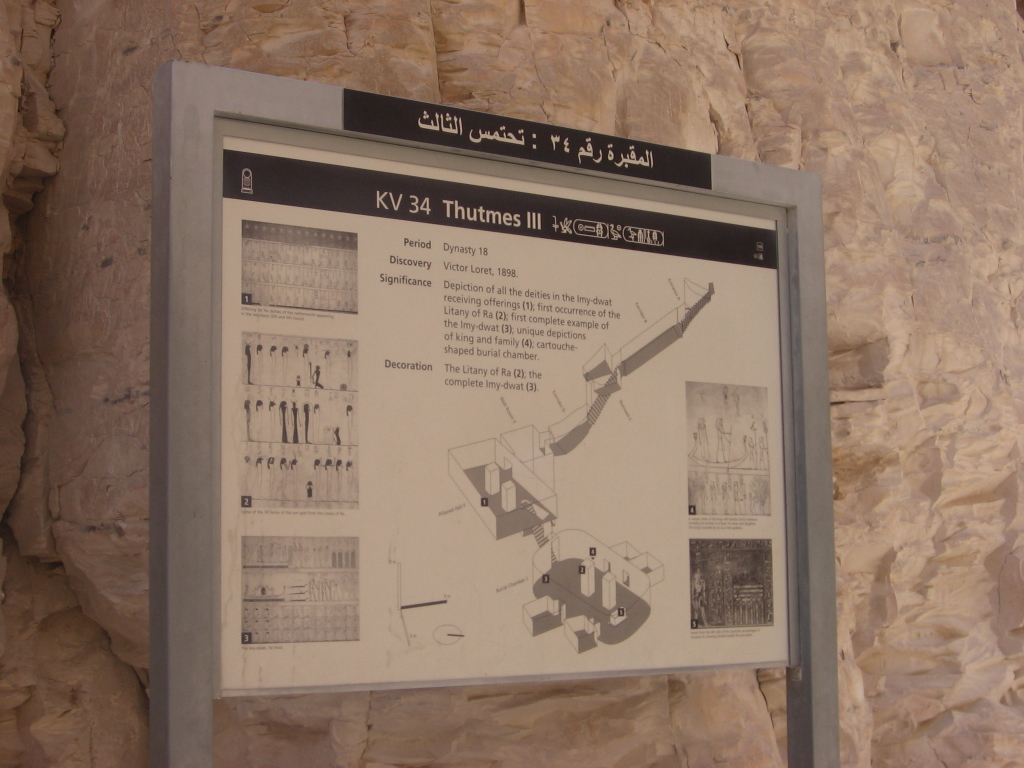 Plànol de la tomba KV34, de Tutmosis III - Vall dels Reis (Egipte)